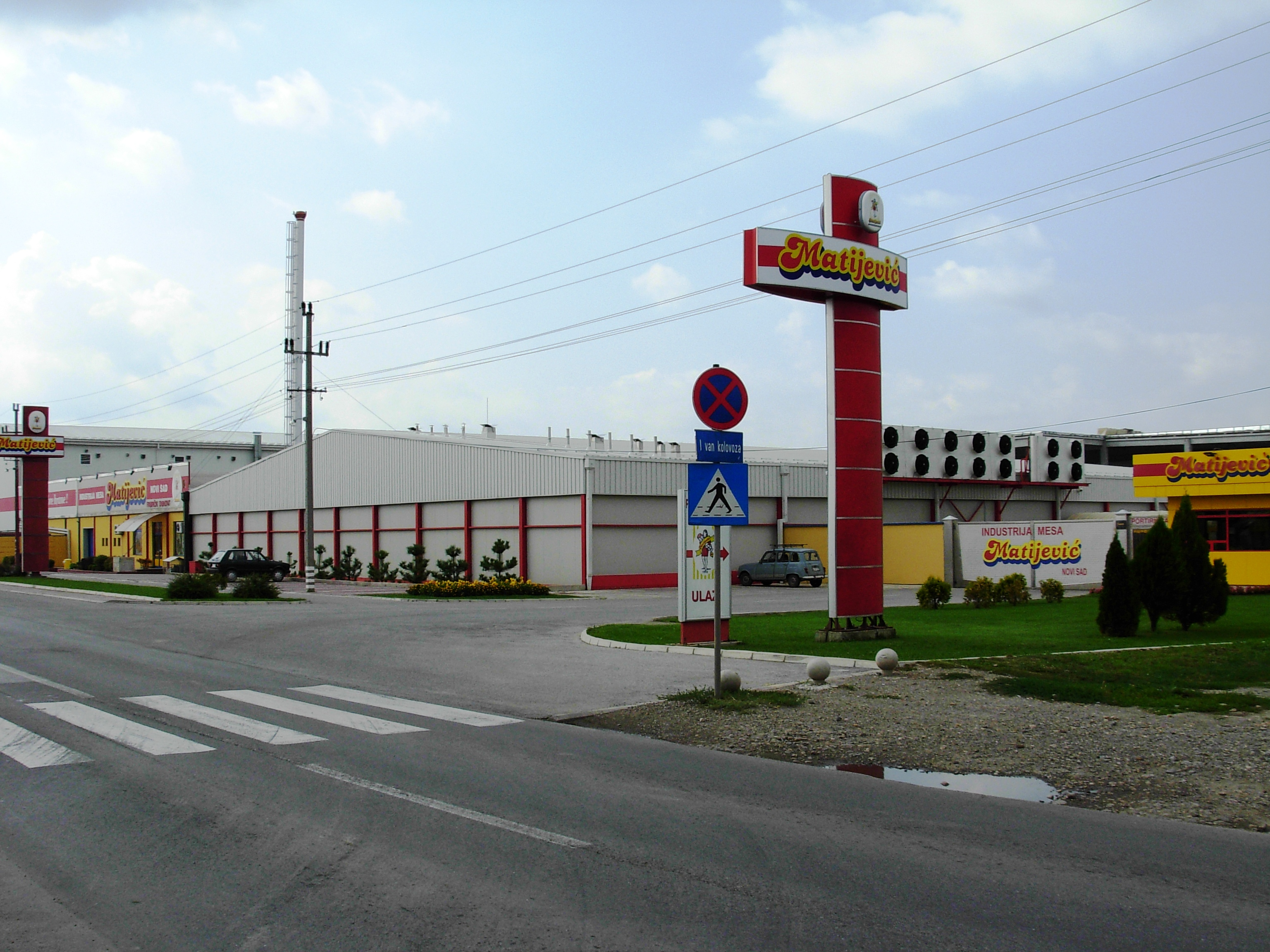 Mesna industrija "Matijević", Novi Sad.